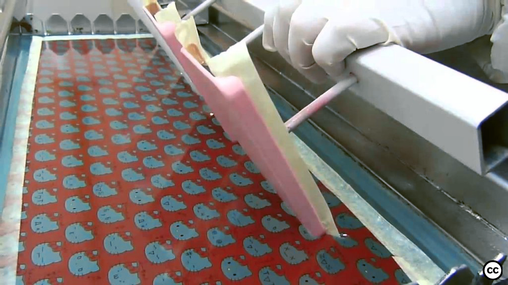 Proceso de hidroimpresion 3d